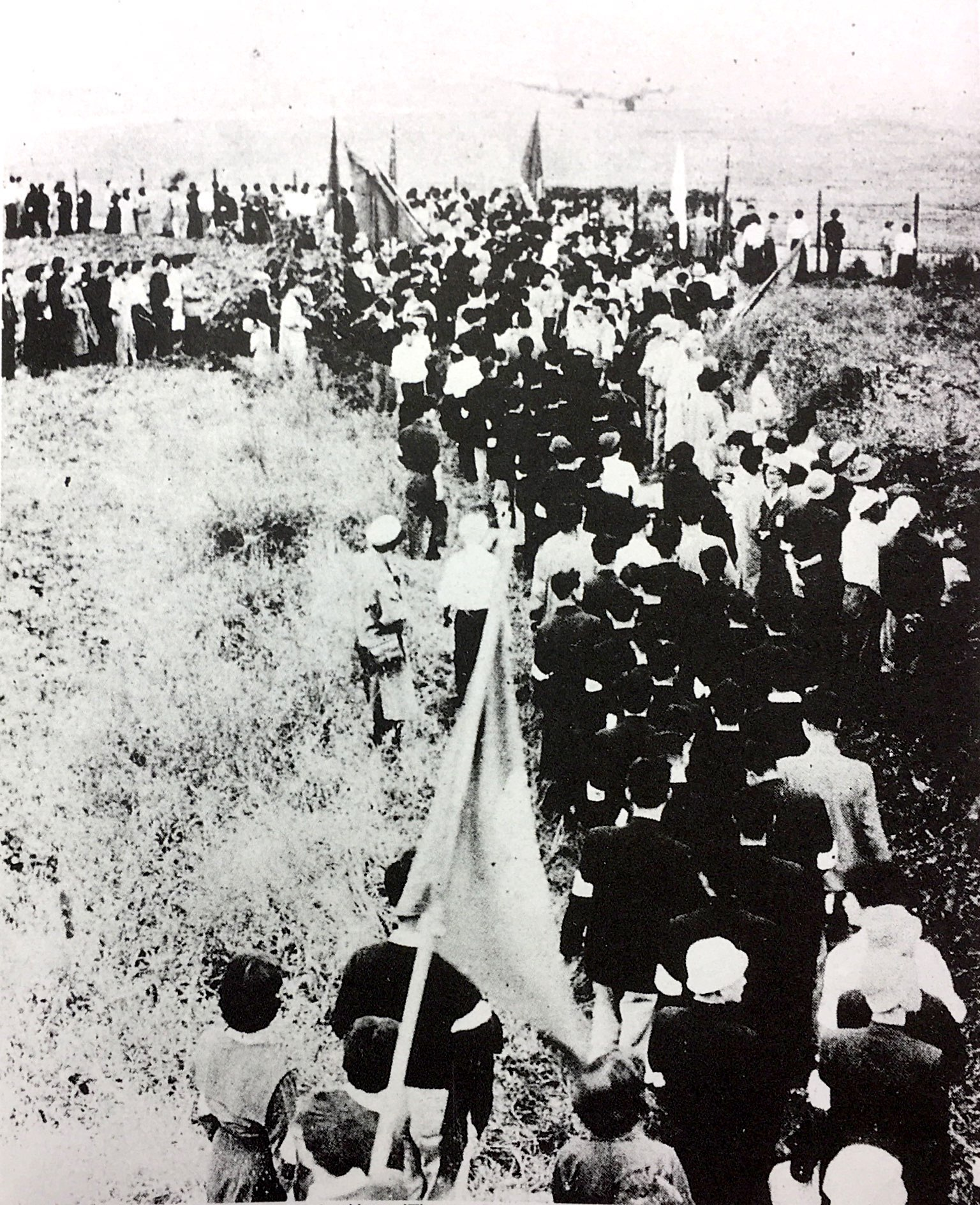 砂川闘争に参加するw:ja:全学連の学生